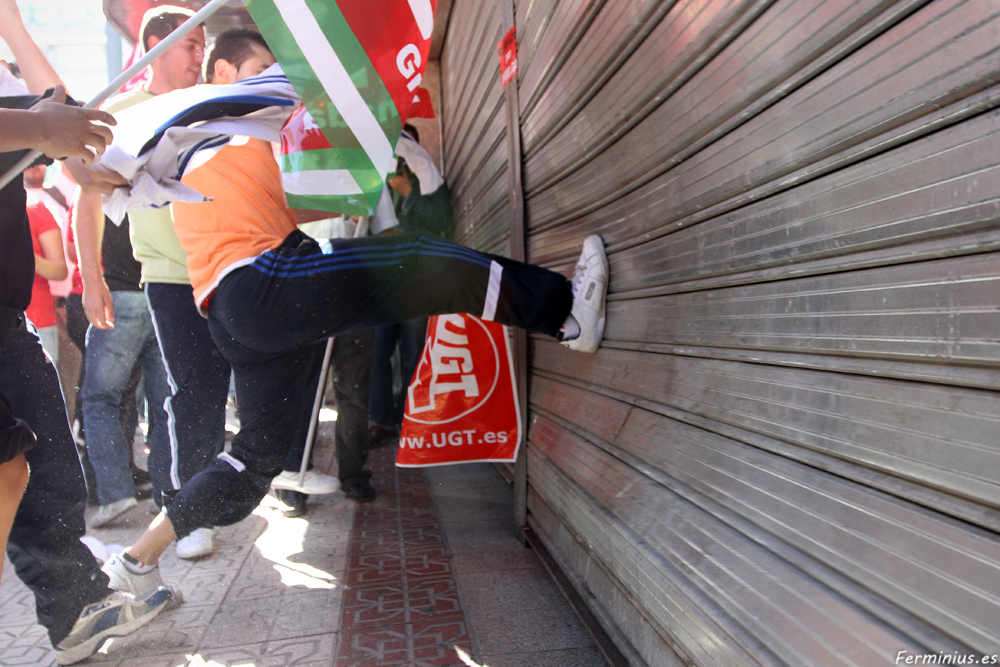 Piquets "informatius" a la Vaga General del 29-S en Granada.